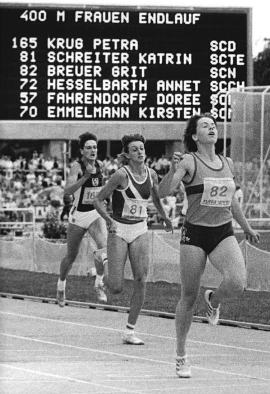 Grit Breuer, Katrin Schreiter, Petra Krug ADN-ZB Koard 22.7.89 Neubrandenburg: 40. DDR-Leichtathletik-Meisterschaften- Grit Breuer (vorn) vom SC Neubrandenburg gewann den 400-m-Lauf. Mit der Zeit von 50,48 s egalisierte die Junioren-Weltmeisterin die bestehende Jahresbestleistung. Auf den Plätzen folgten Katrin Schreiter (Nr. 81, Turbine Erfurt) und Petra Krug (l.) vom SC Dynamo Berlin.